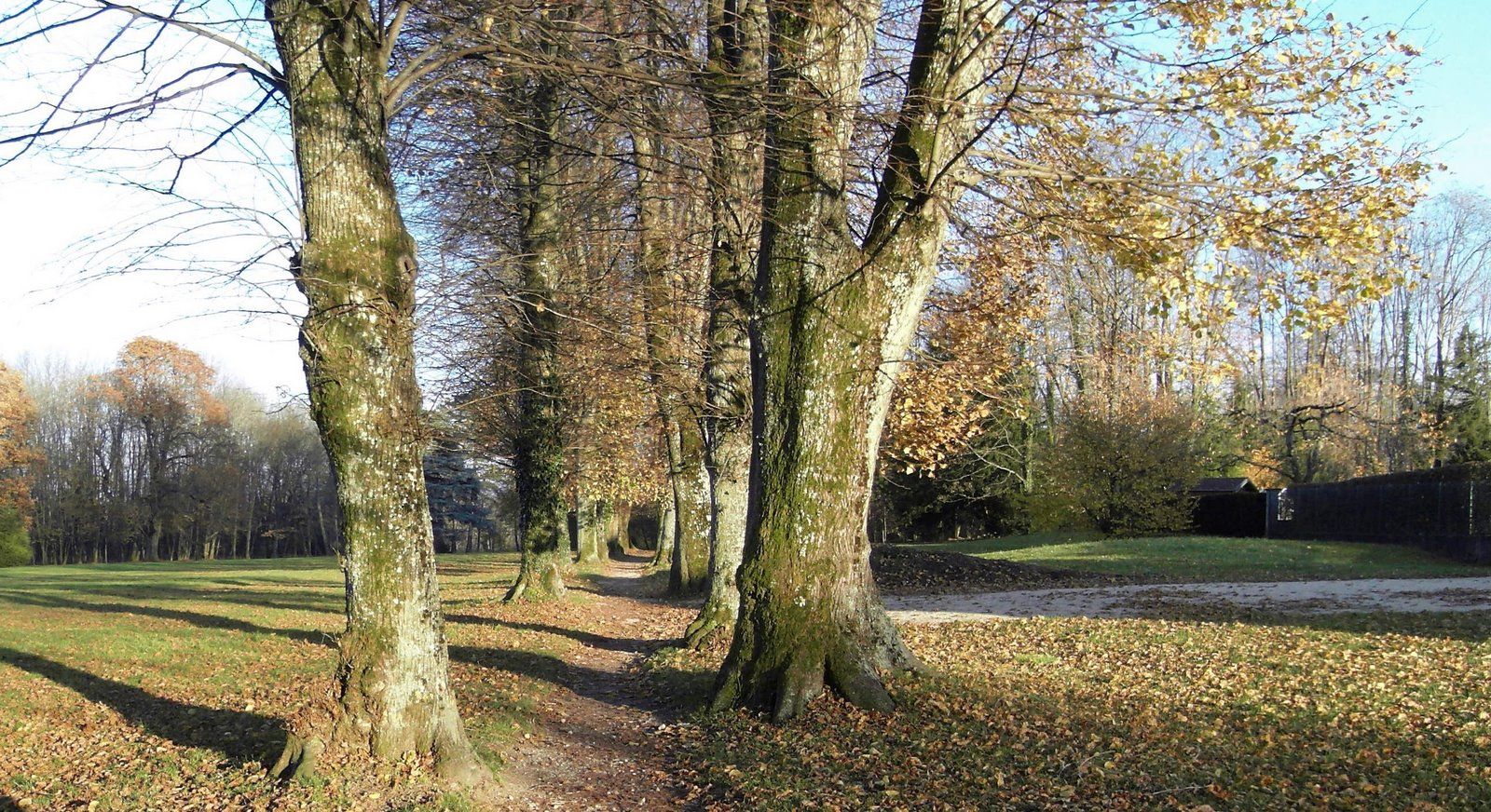 Allée de tilleuls au parc des cèdres